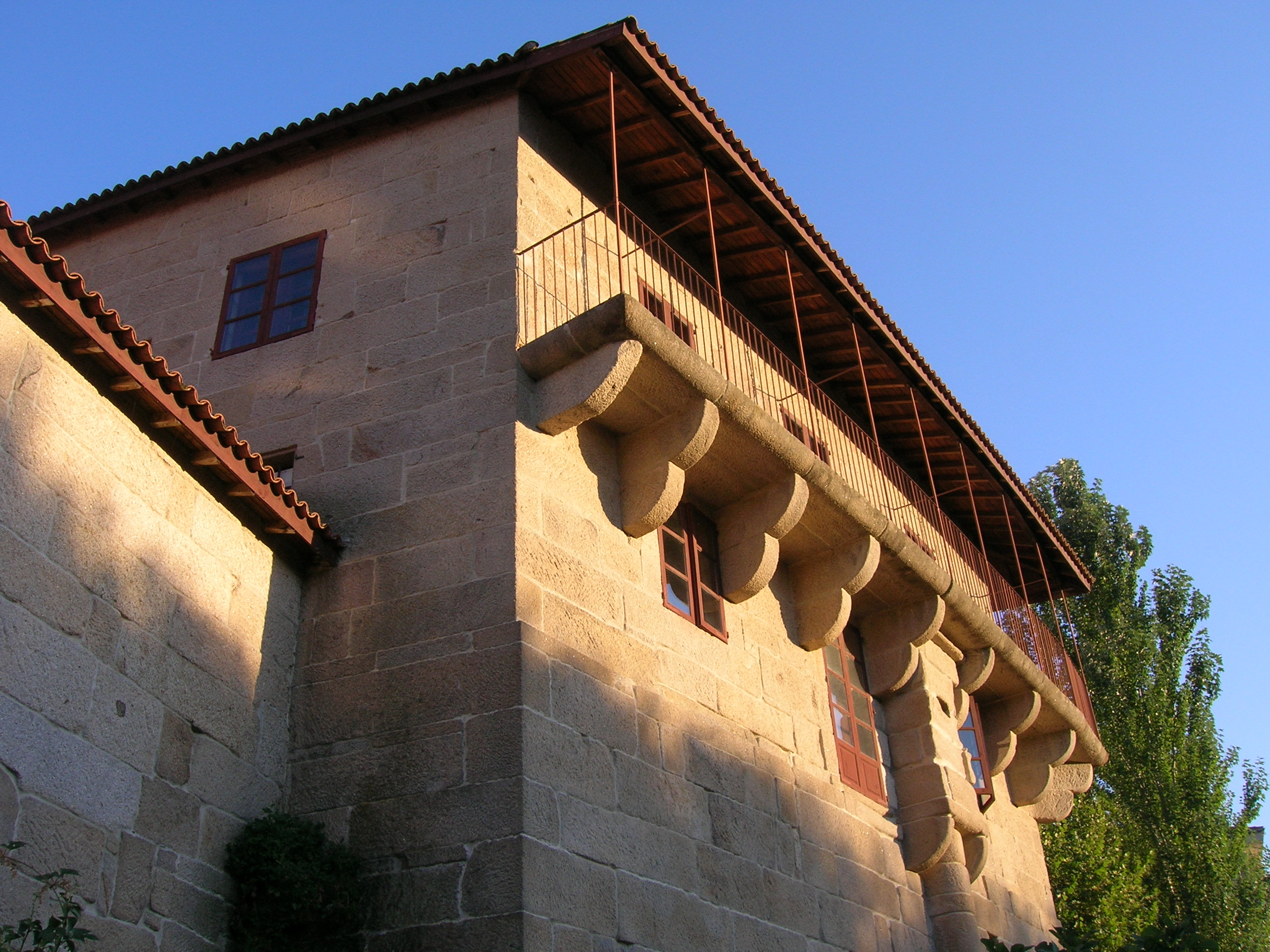 Bonita balconada de una casa en Allariz.